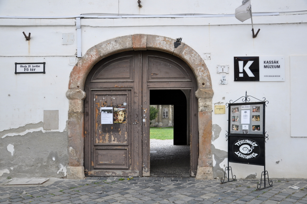 Zichy Palace, Óbuda, Budapest, Hungary